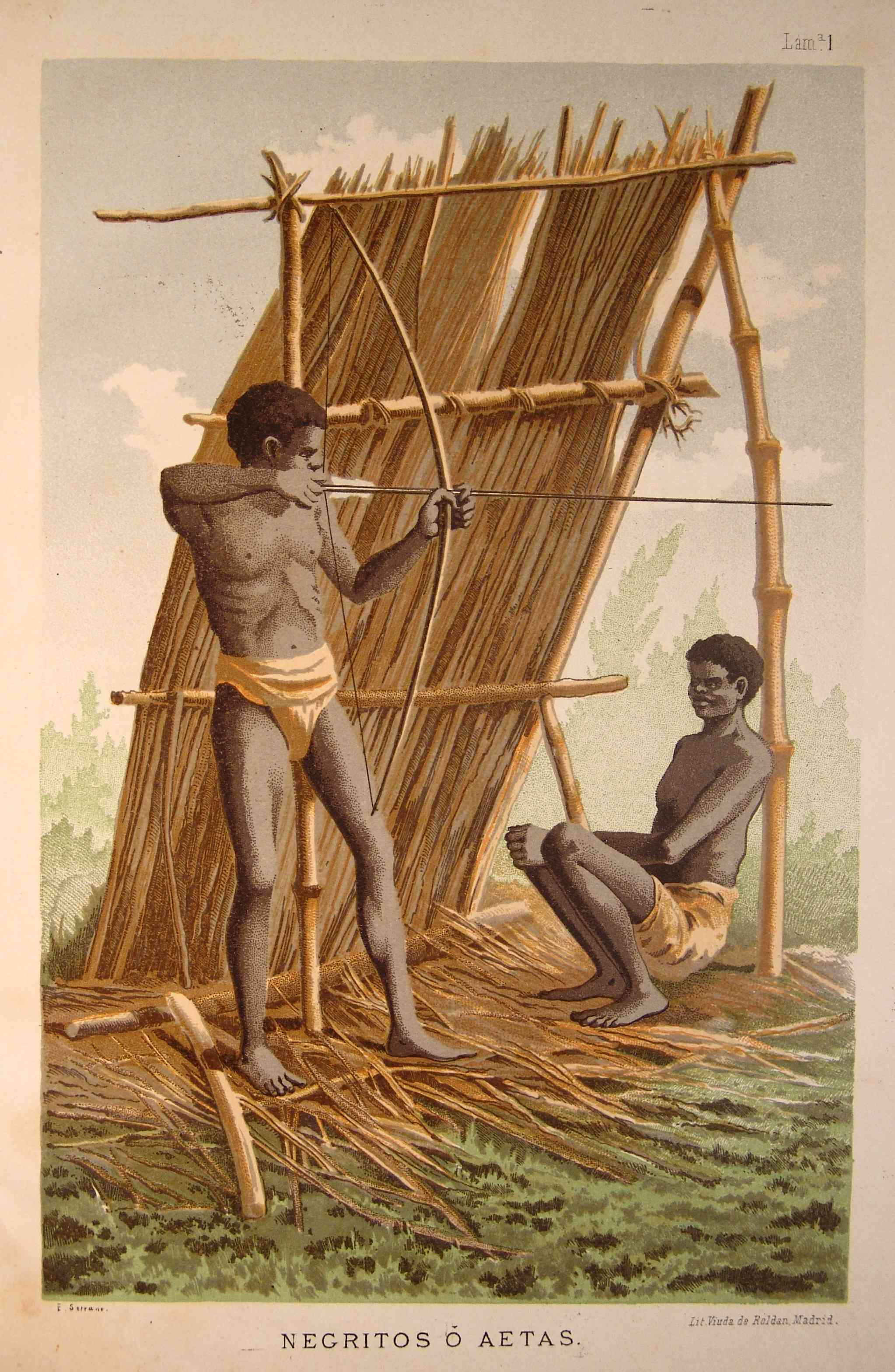 Puede acceder al libro completo en el siguiente enlace : Bosquejo geográfico e histórico-natural del archipielago filipino / por Ramón Jordana y Morera. - Madrid : Imprenta de Moreno y Rojas, 1885